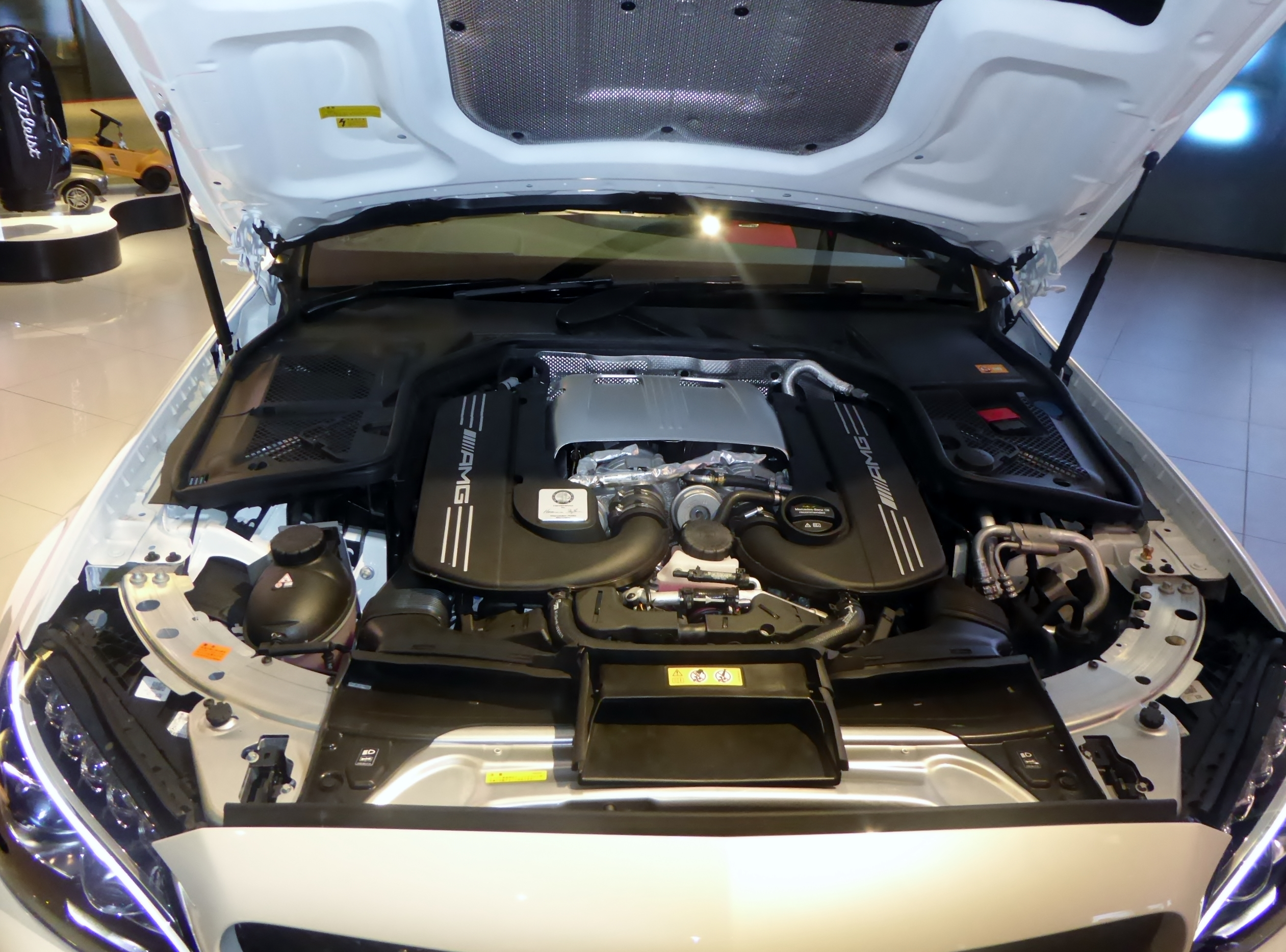 W205型メルセデス・AMG C63 Sのエンジンルームを撮影。